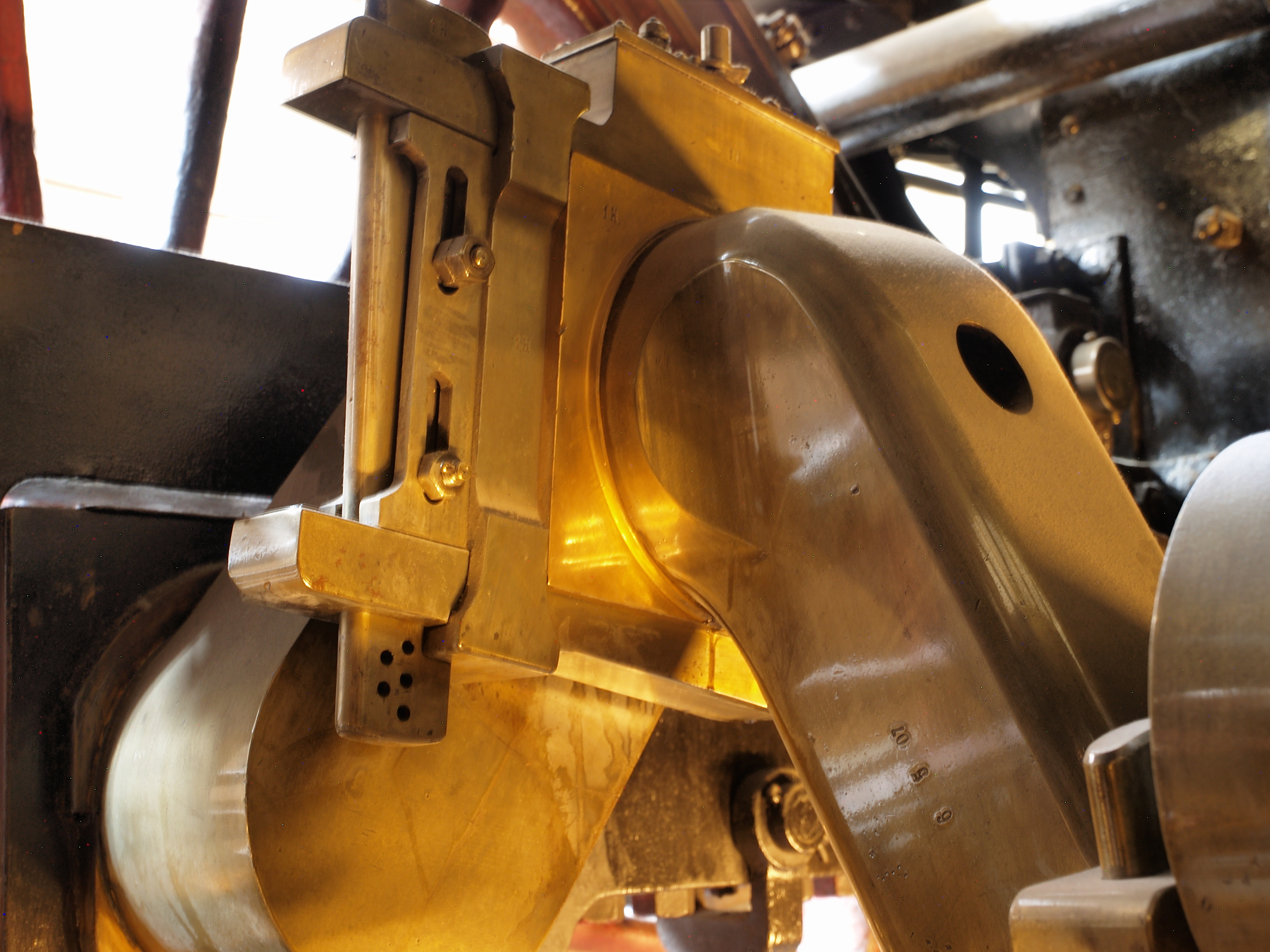 Verkehrsmuseum Nürnberg, Bayerische Lokomotive S 2/6, Kurbelwelle des innen liegenden Zylinders